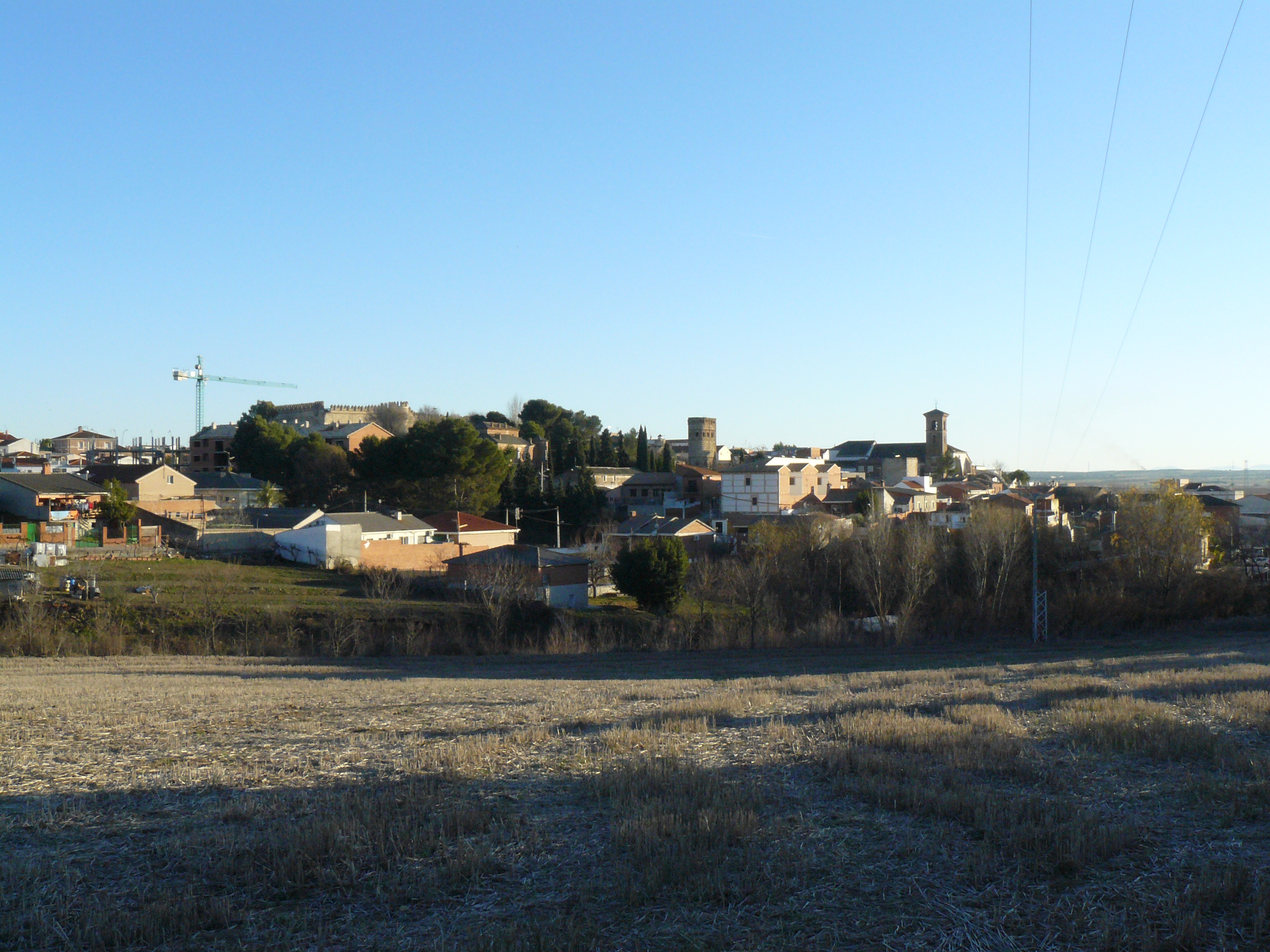 Vistas de Maqueta desde el GR-239.